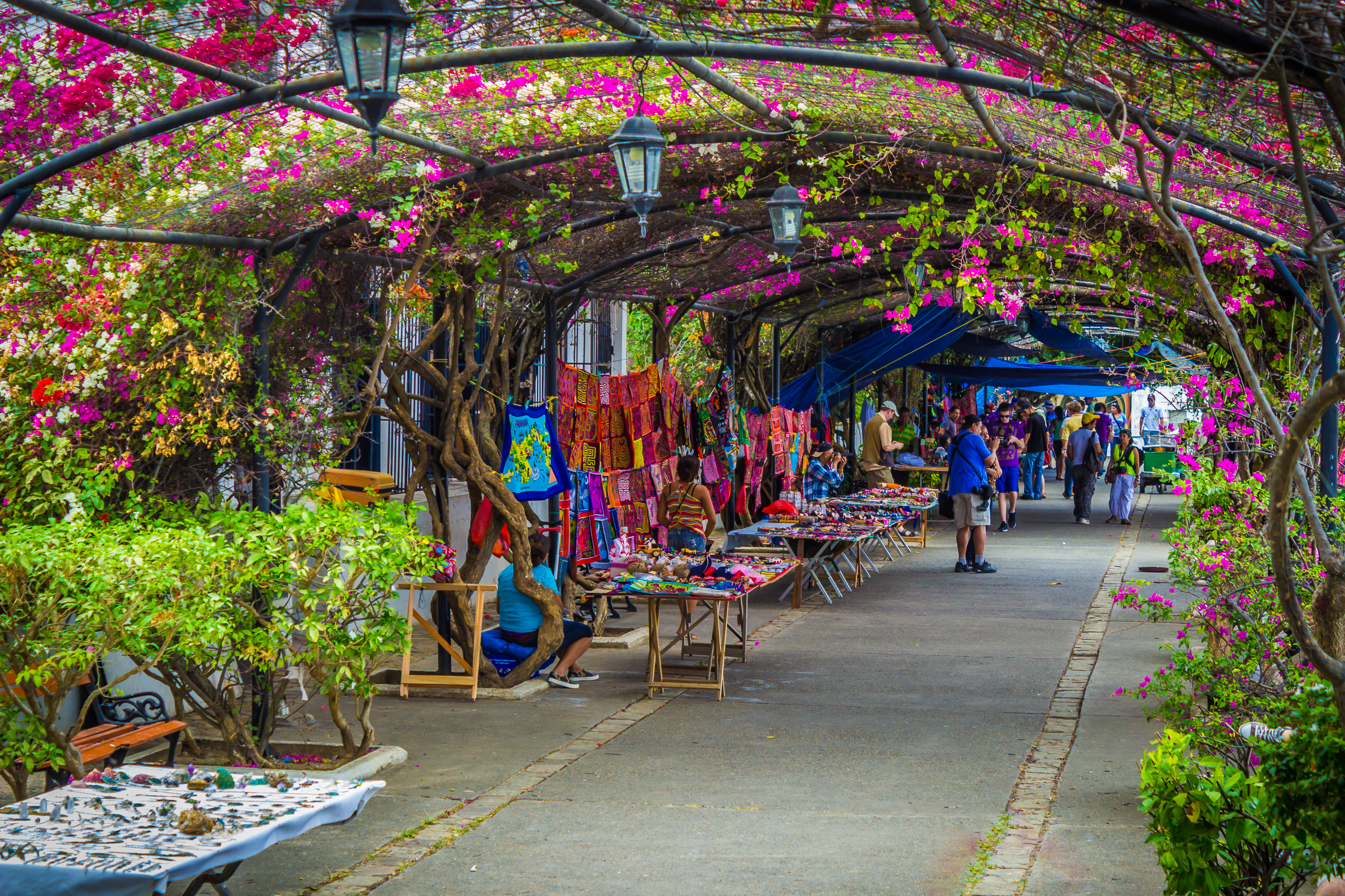 Paseo General Esteban Huertas